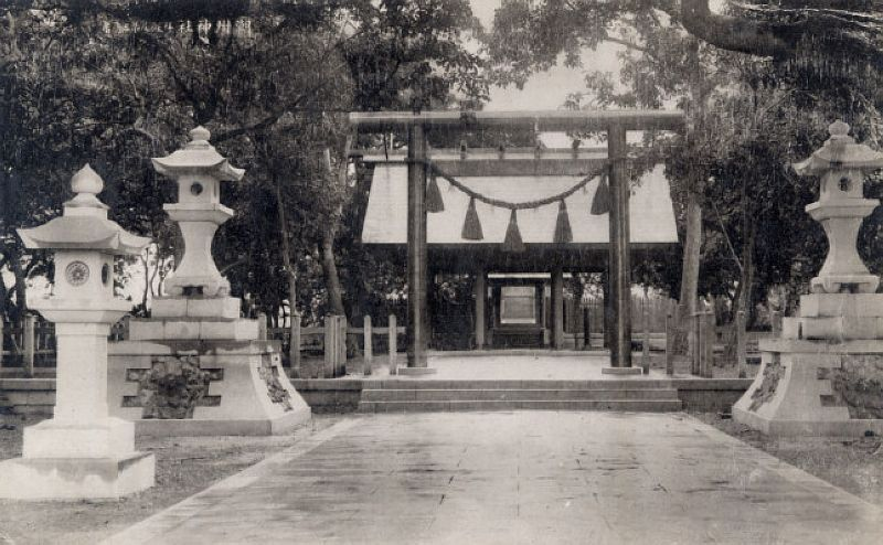 潮州神社（位在今屏東縣潮州鎮）